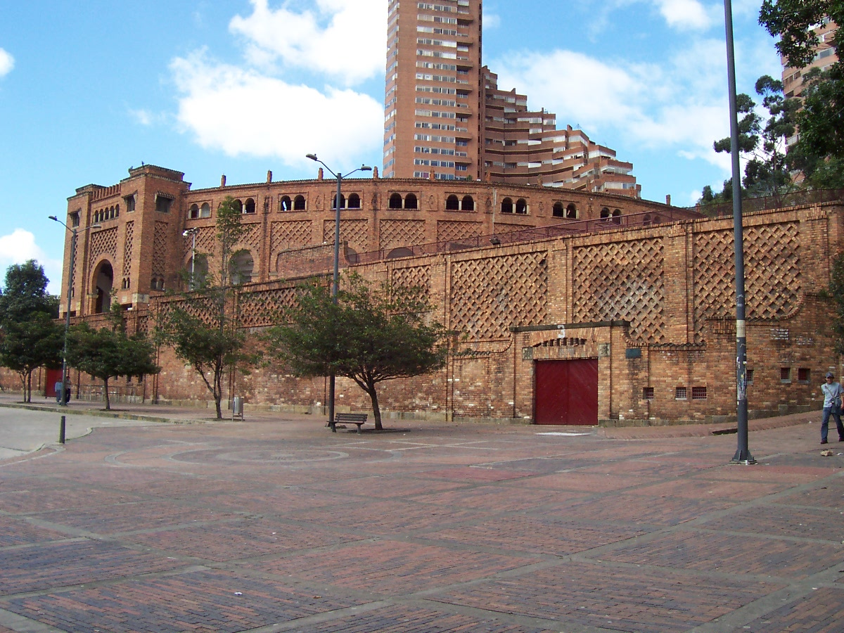 Plaza de toros de Bogotá